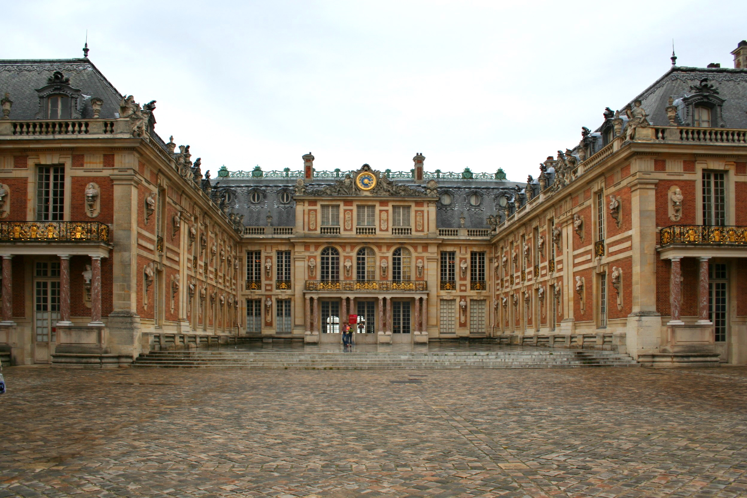 Una parte della facciata frontale del palazzo di Versailles